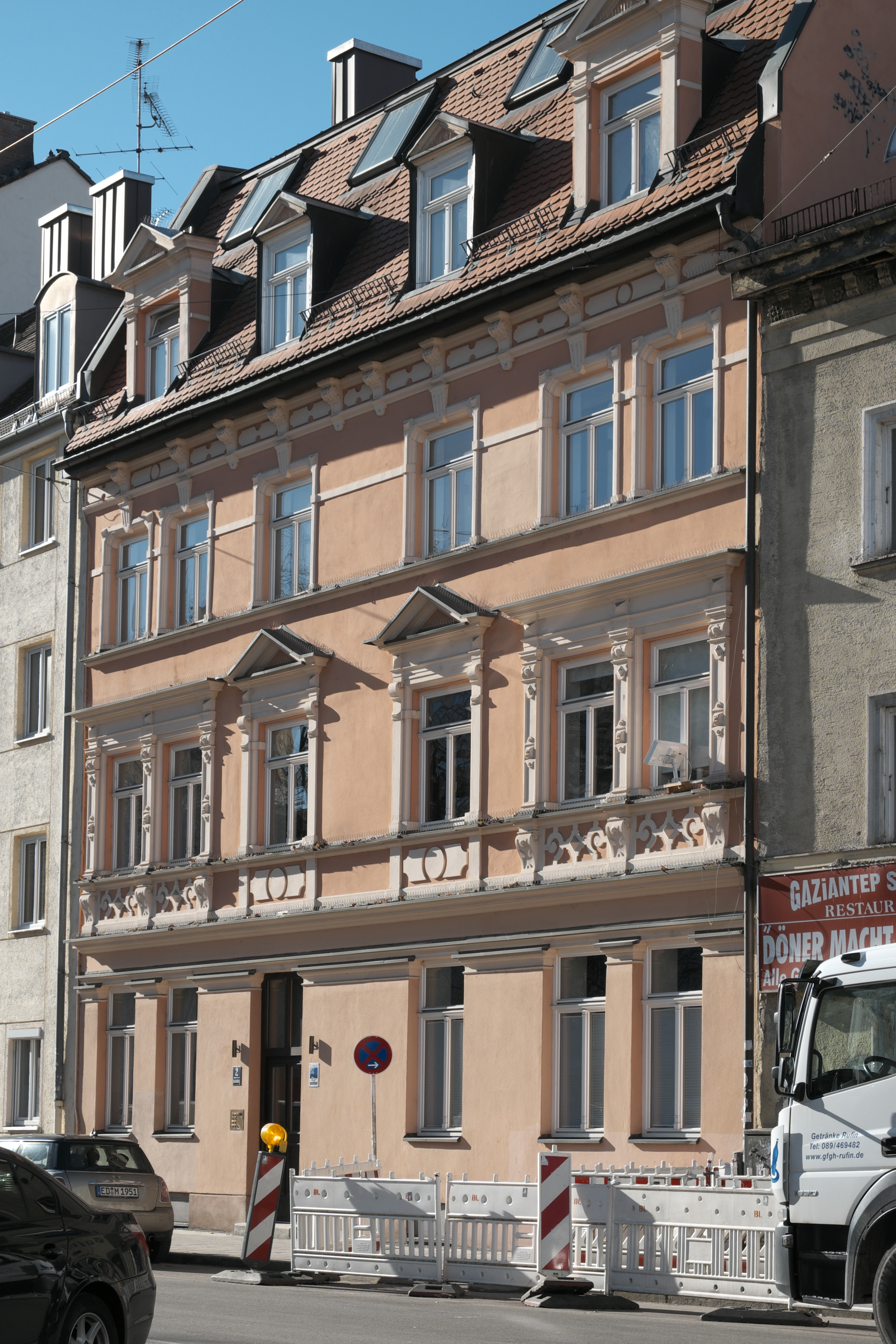 Mietshaus in der Schießstättstraße 2 im Stadtbezirk Schwanthalerhöhe in München (Bayern/Deutschland), 1887 von K. Gustapfel erbaut